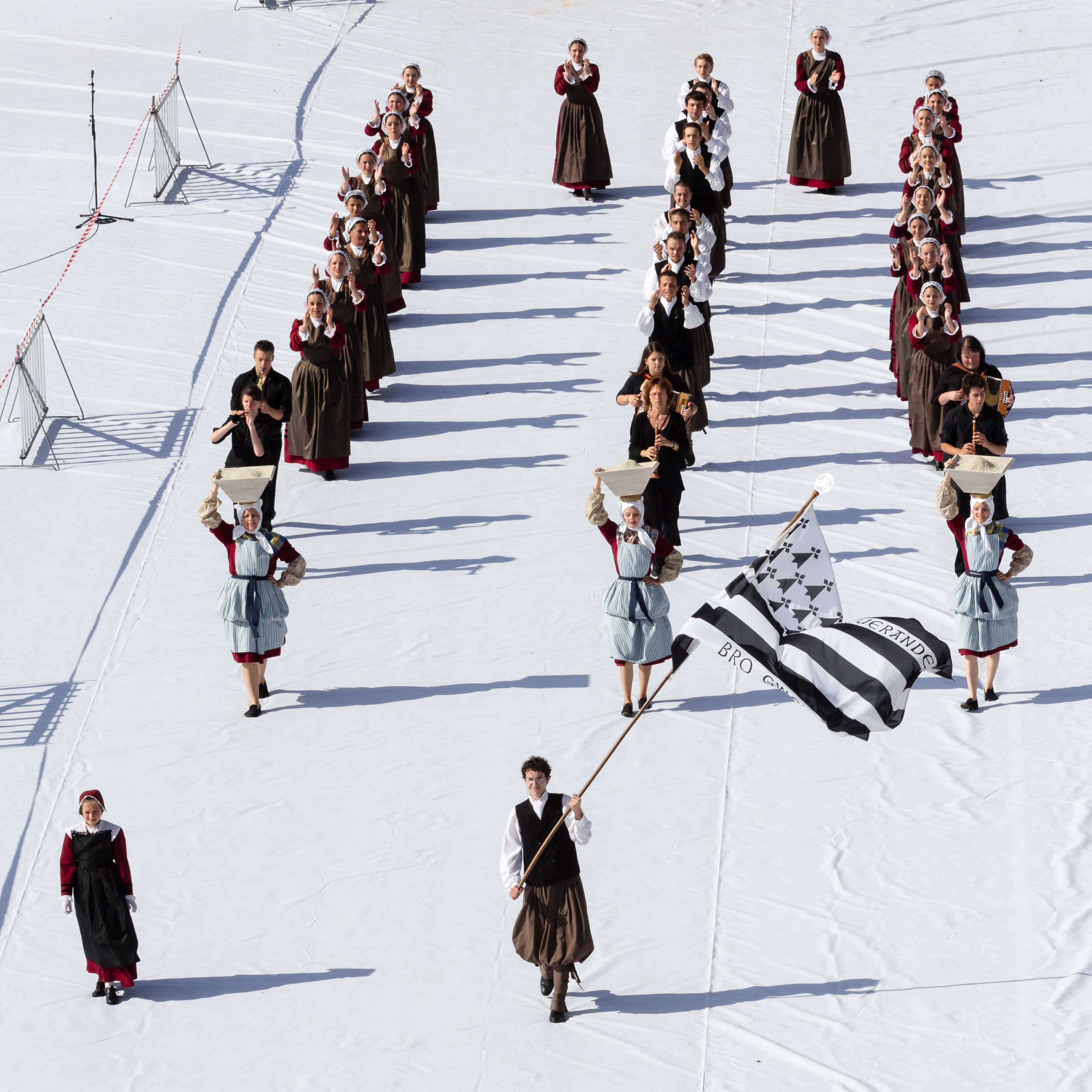 FIL 2012 - Arrivée de la grande parade des nations celtes - Cercle bro Gwenrann